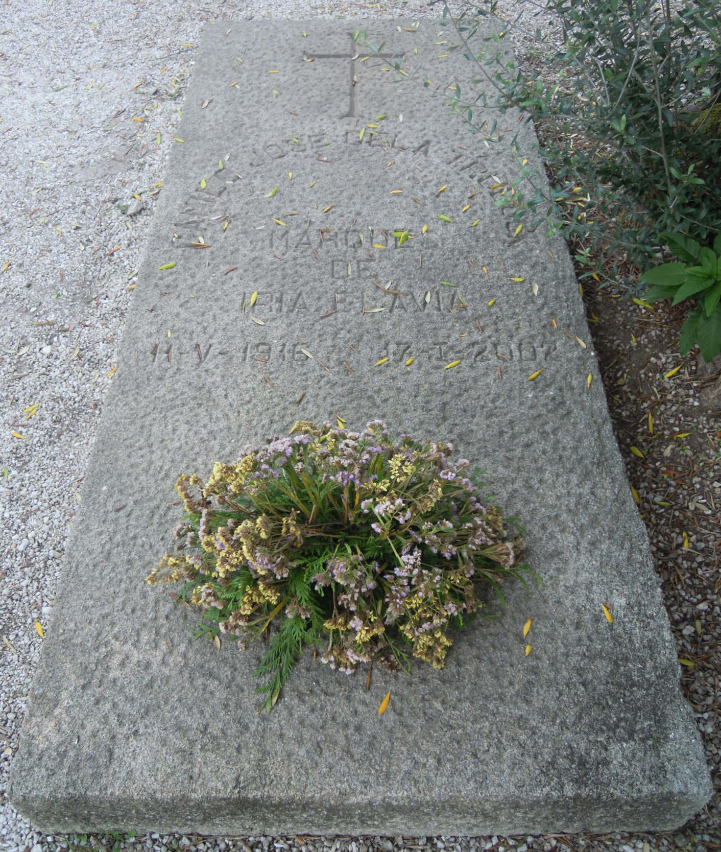 Lápida do sartego de Camilo José Cela, no camposanto de Adina, xunto á na igrexa de Iria Flavia.